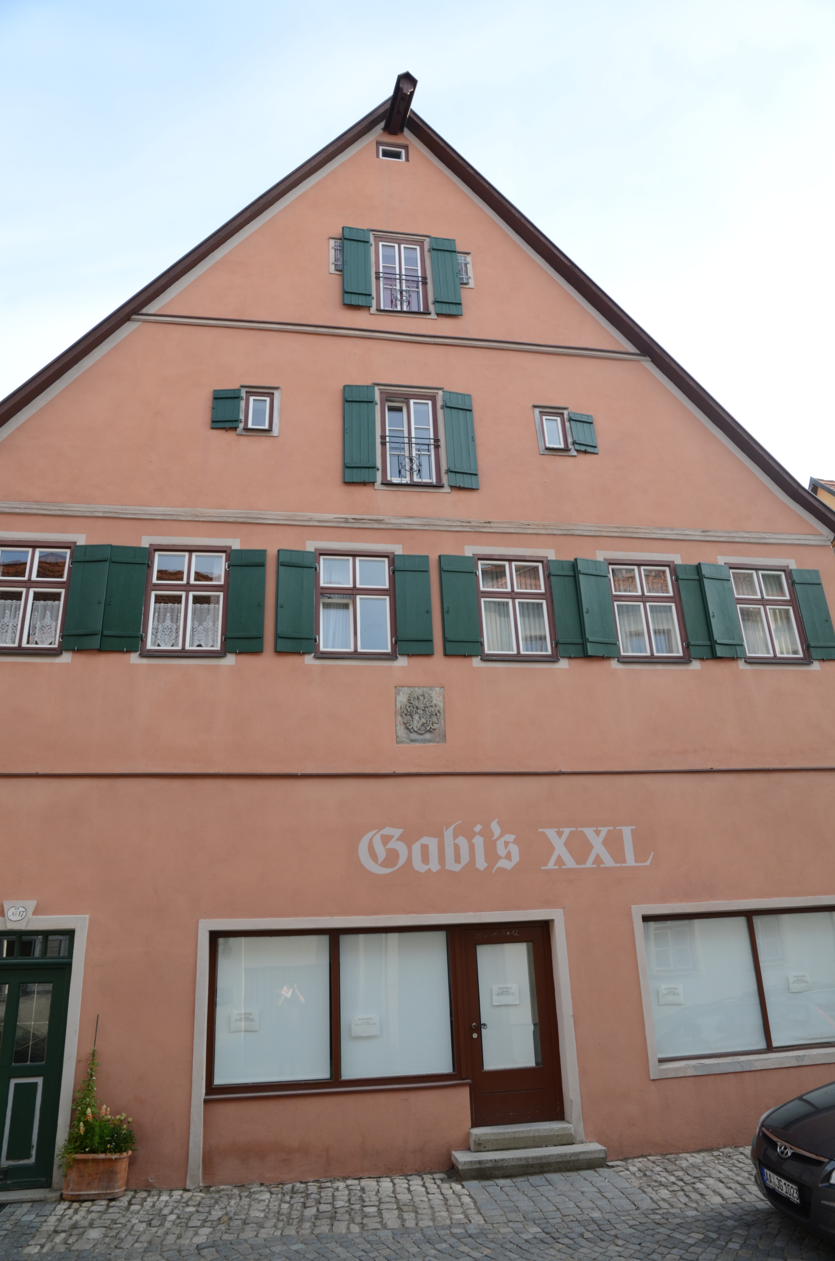 Baudenkmal in Dinkelsbühl. Adresse siehe Dateiname.